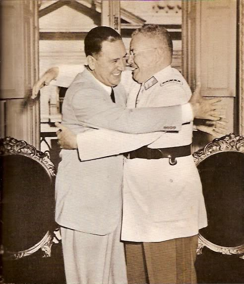 Abrazo de los presidentes de la República de Chile, gral. Carlos Ibáñez del Campo, y de la República Argentina, gral. Juan Perón, el 21 de febrero de 1953.